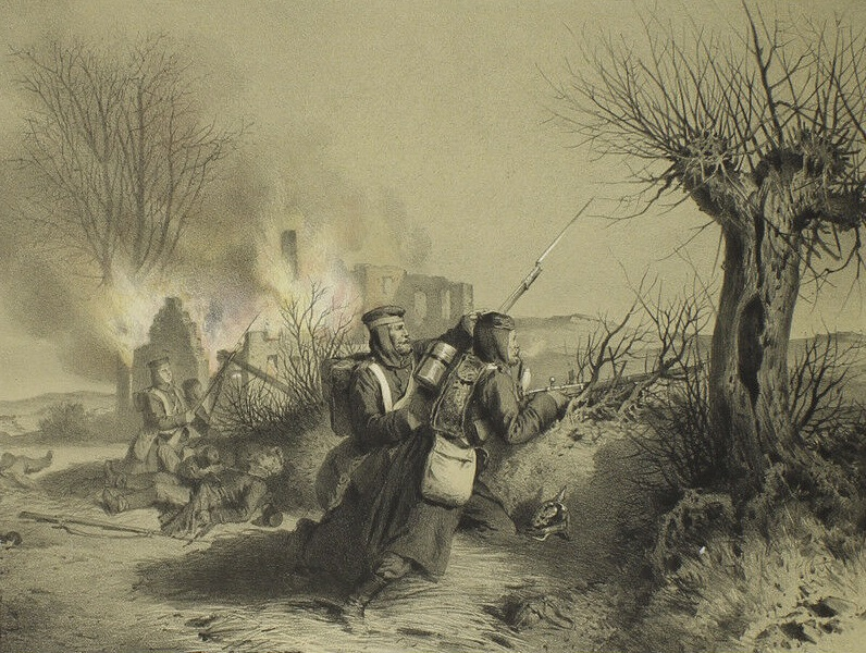 Vorposten gegen die Schanzen nach dem Gefecht in und bei Düppel